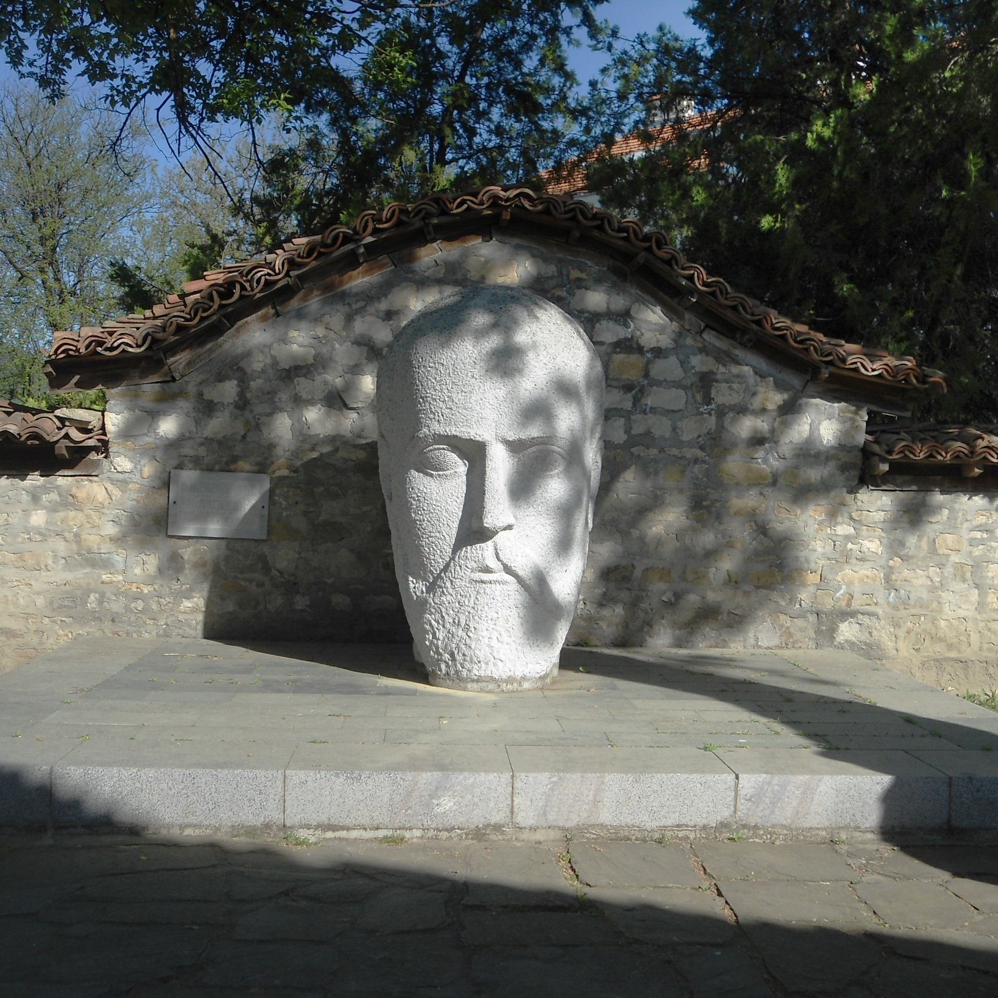 Паметник на Дженюариъс Алойшиъс Макгахан в гр.Елена